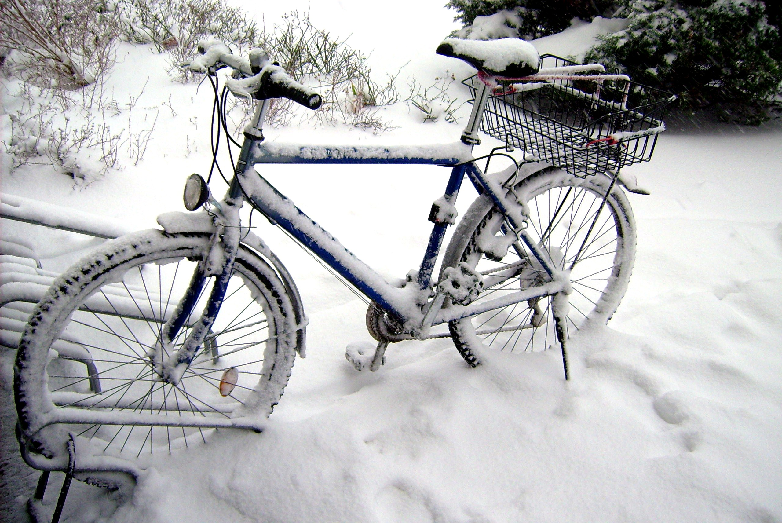 Fahrrad im Winter